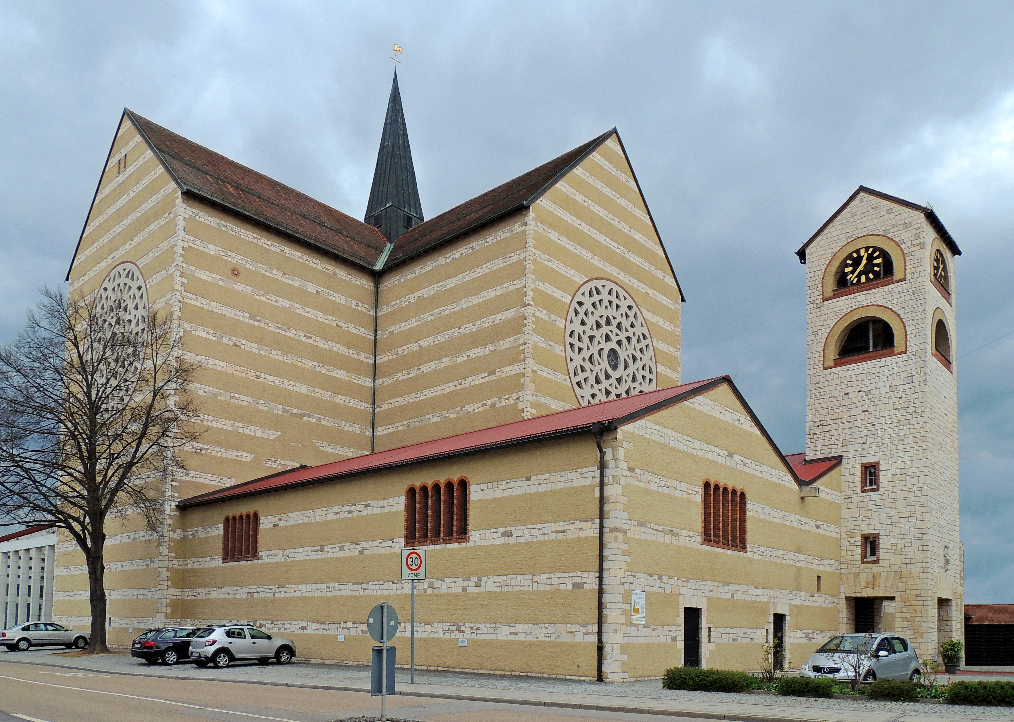 Regensburg, kath. Kirche St. Wolfgang